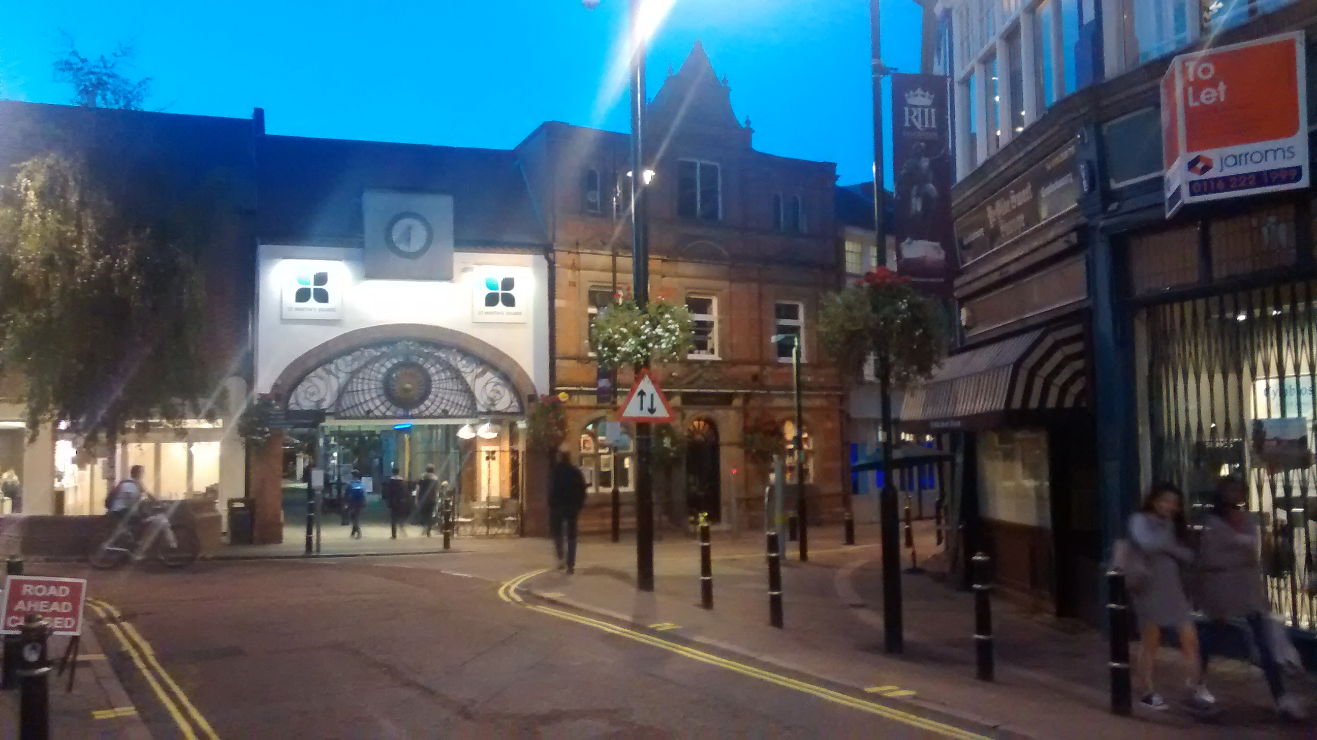 Galeria